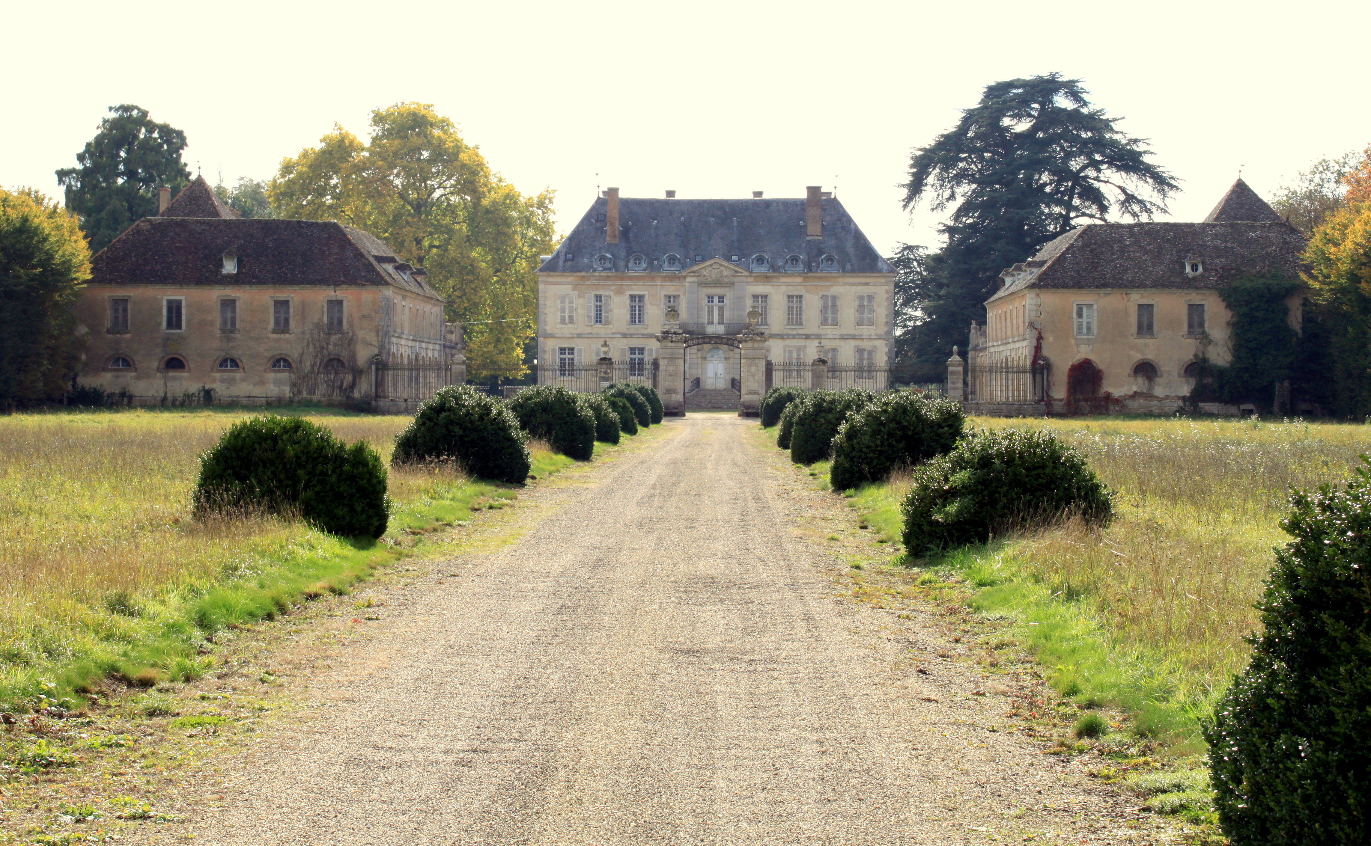 Schloss von Terrans bei Pierre-de-Bresse